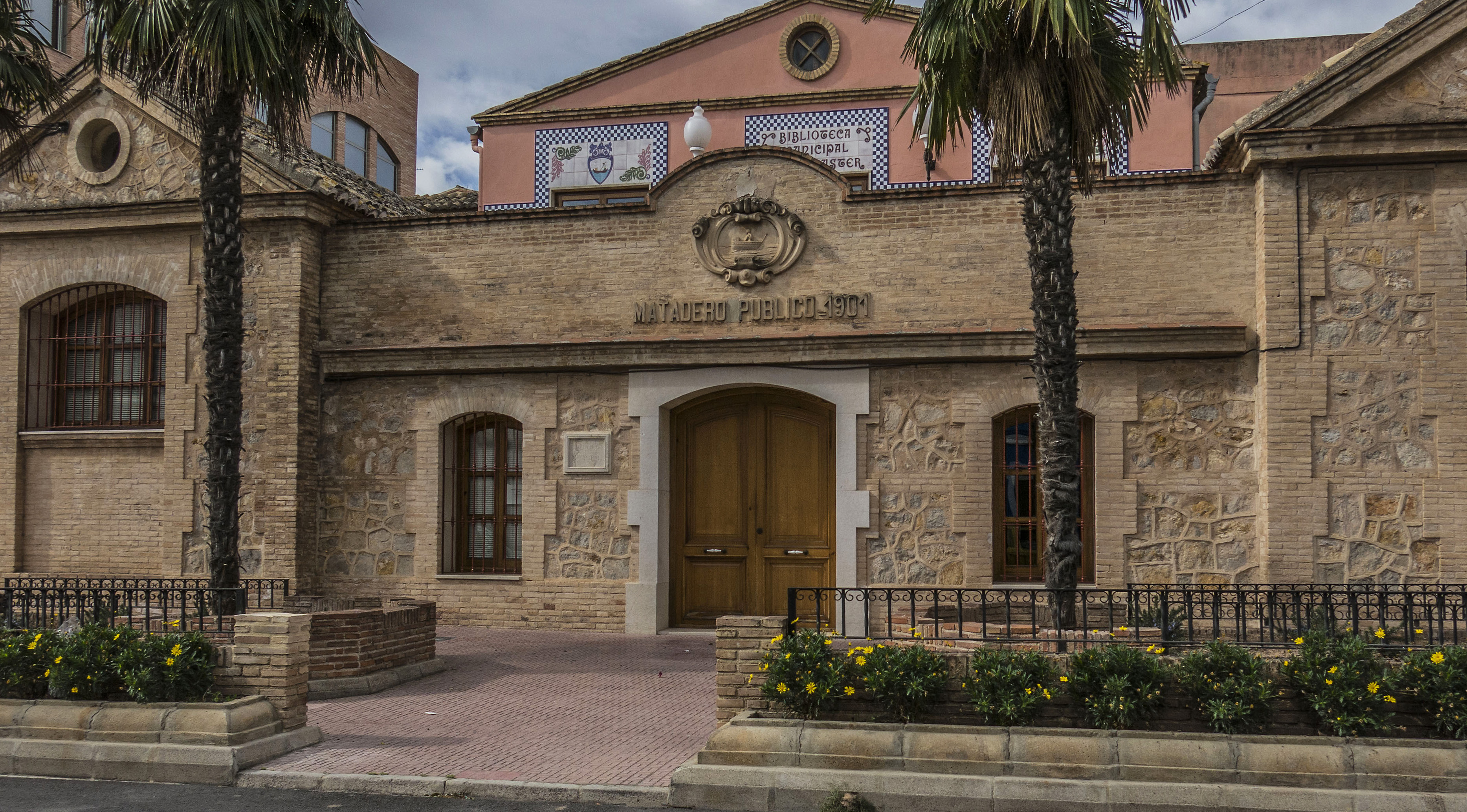 Biblioteca Joan Fuster, antic escorxador d'Albalat de la Ribera, d'estil modernista inaugurat el 1901, i remodelat per a traslladar la biblioteca municipal a mitjan dècada de 1990. Aquesta imatge ha sigut publicada en: País Valencià poble a poble, Albalat de la Ribera, 9-10-2017